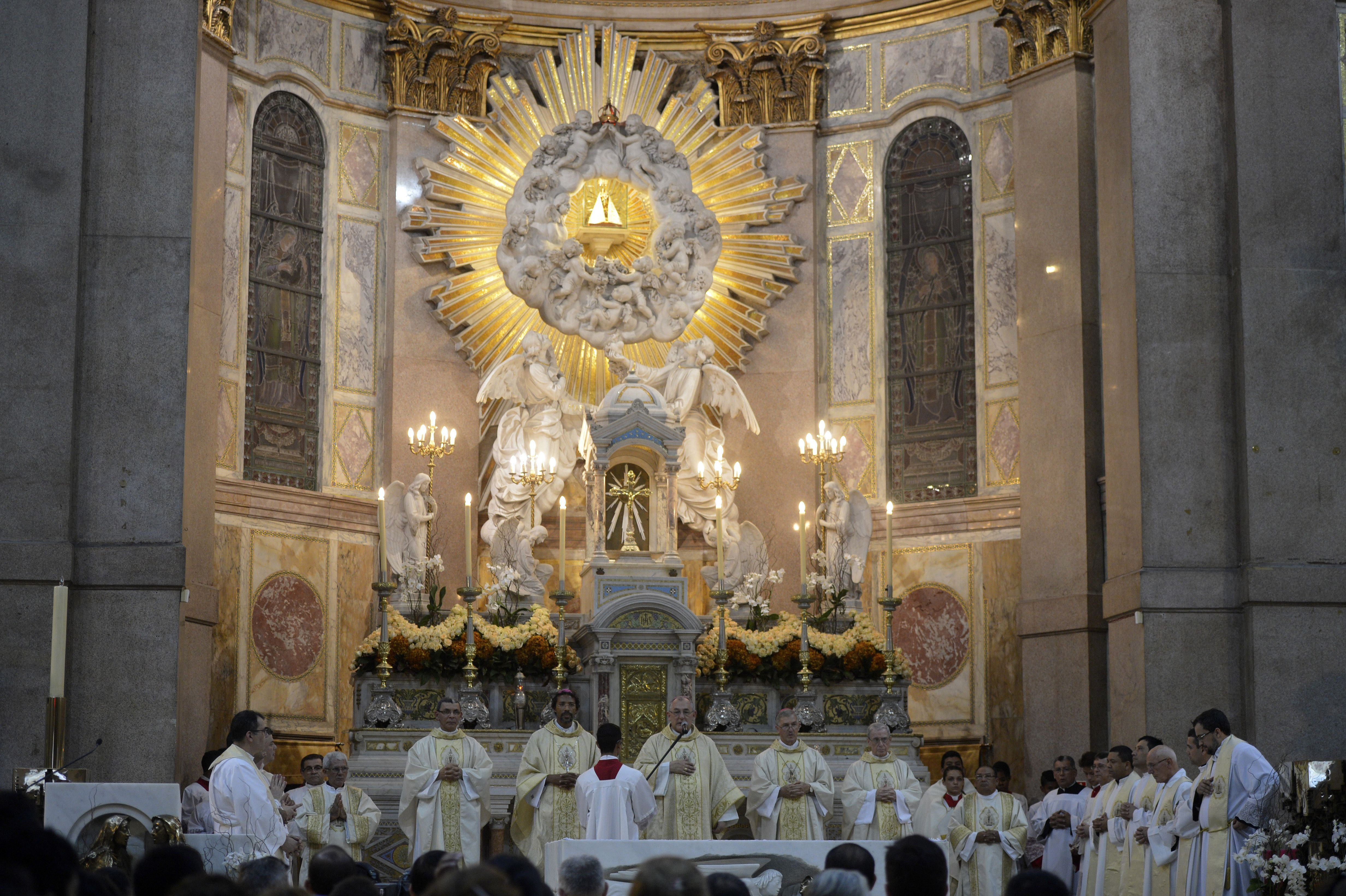 Missa e apresentação do manto de Nossa Senhora de Nazaré